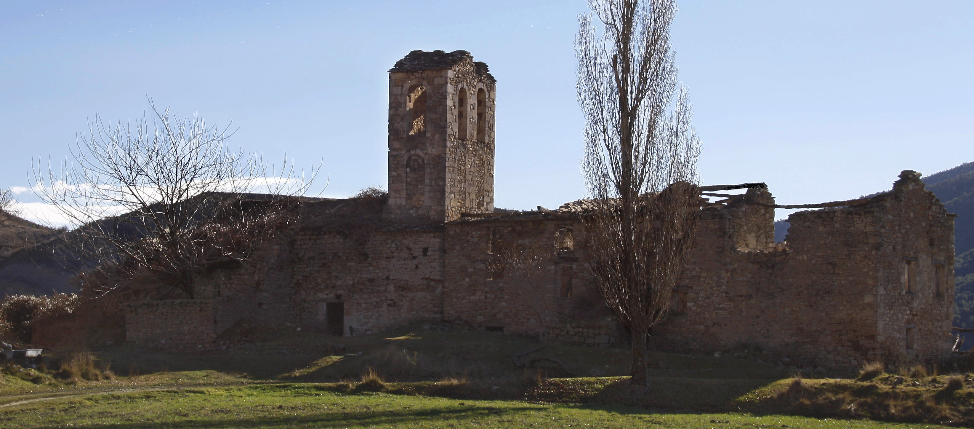 Nocelles és un poble del municipi d'Isàvena, a la Ribagorça aragonesa.